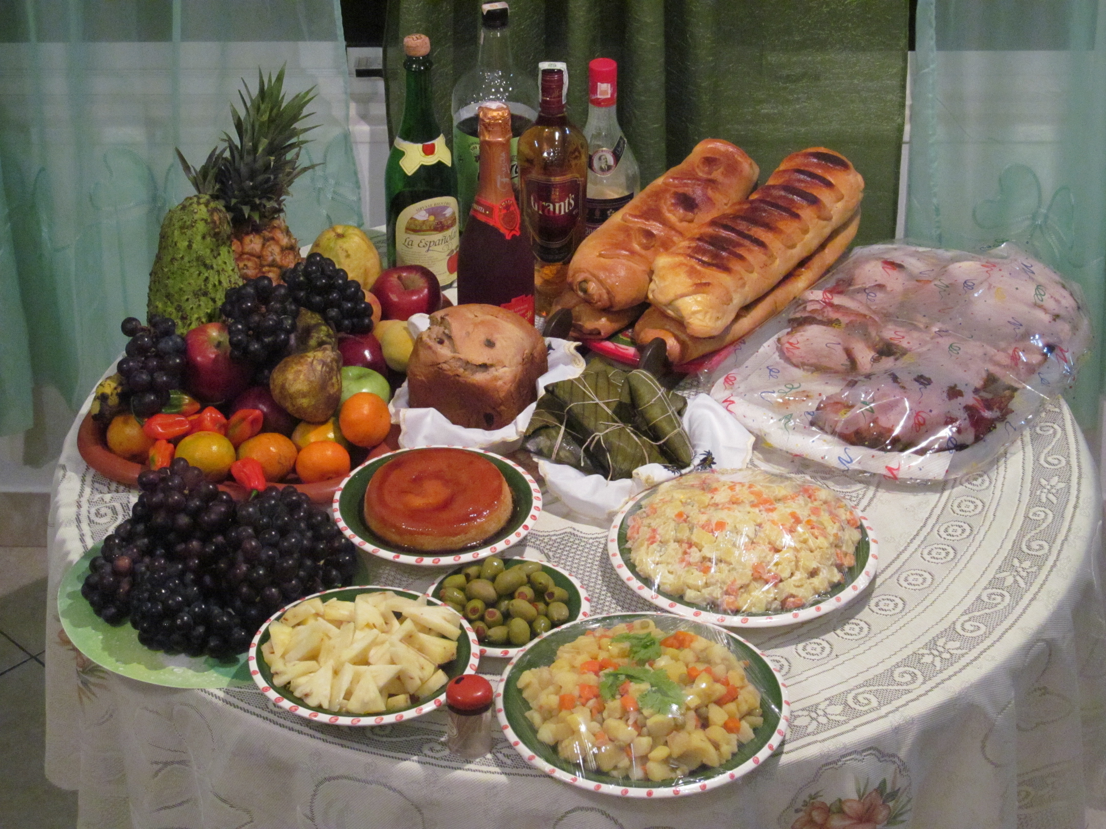 Cena Navideña